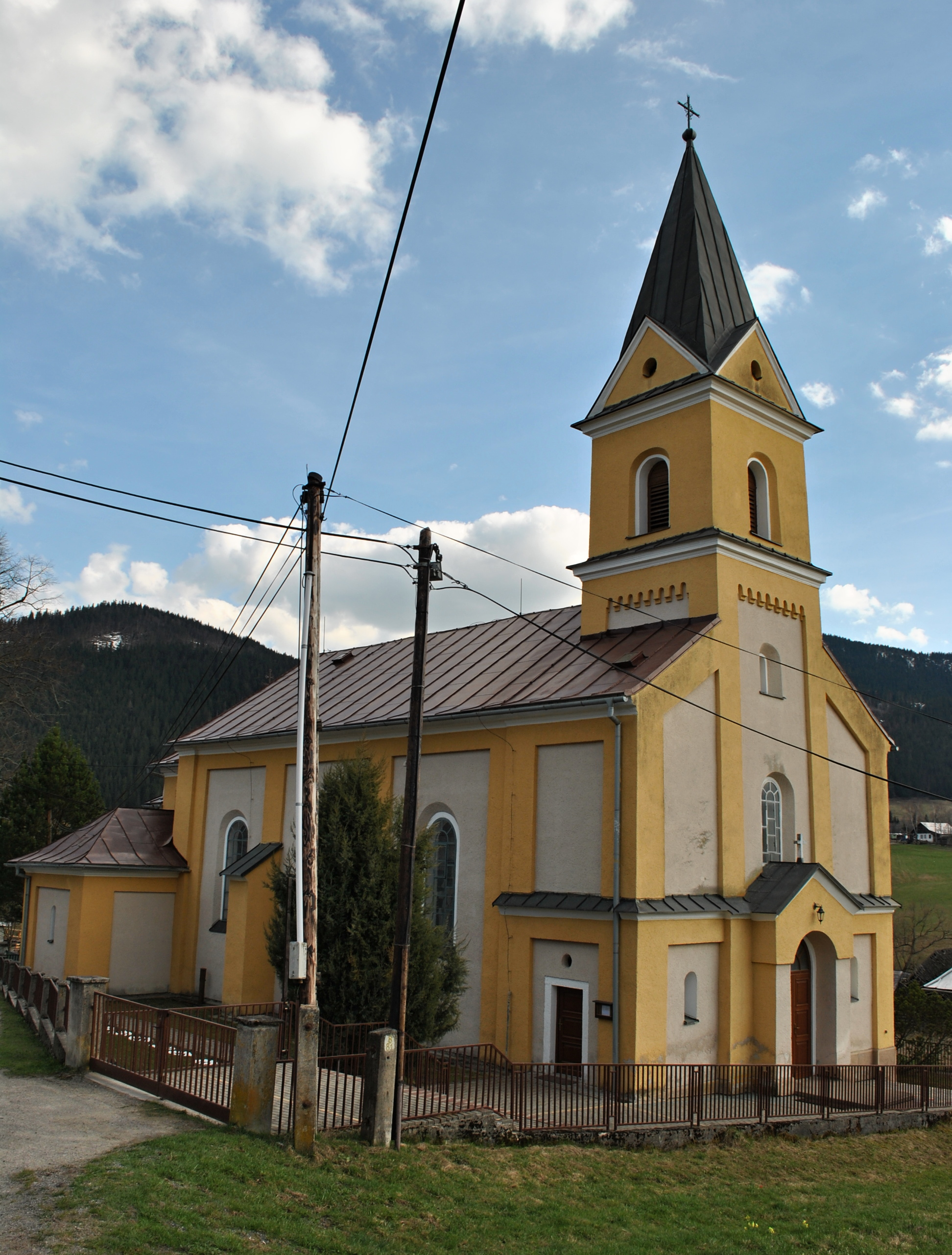 Veľké Borové - rímsko-katolícky kostol povýšenia Sv. kríža